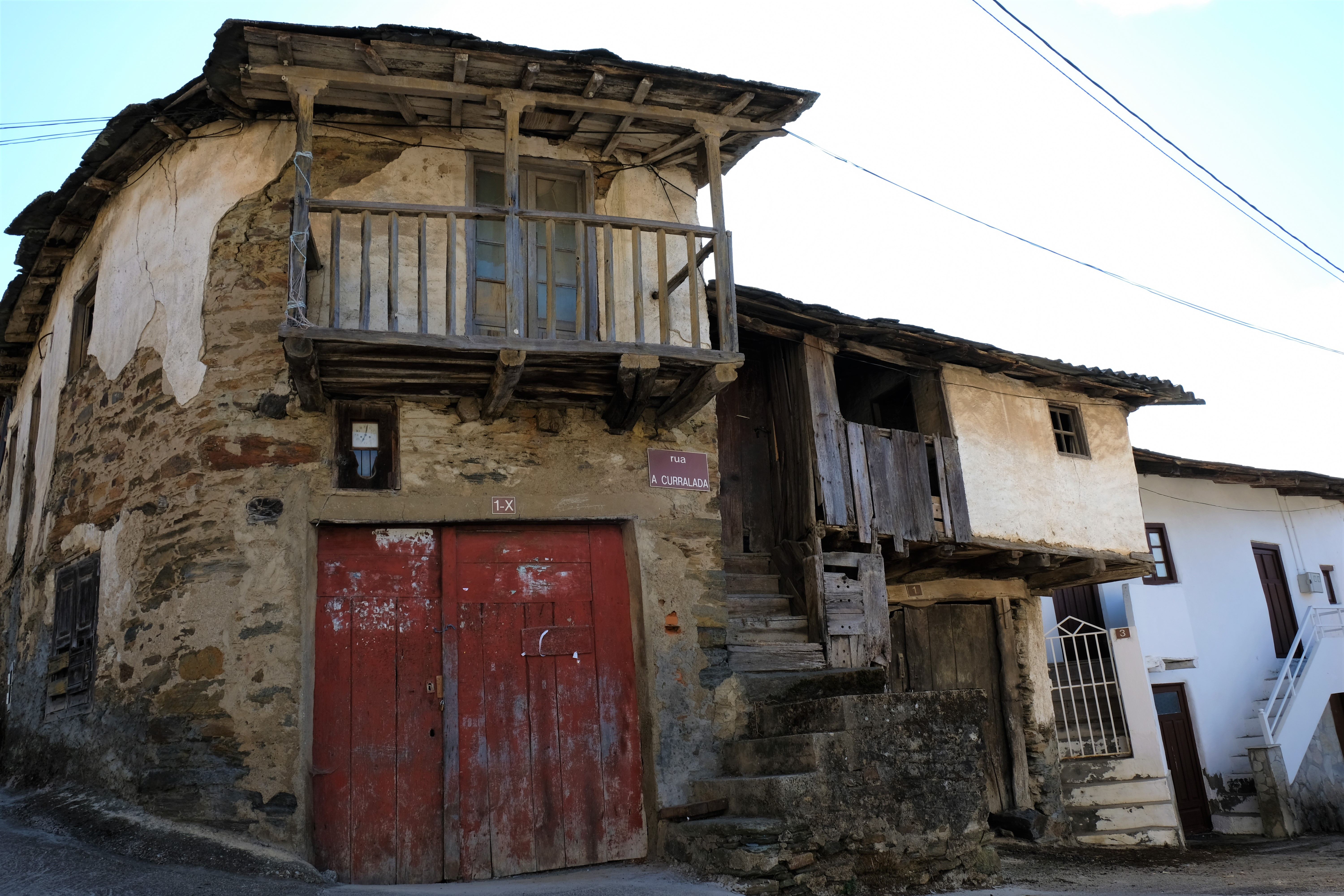 Casa onde se pode observar o reloxo da Parroquia